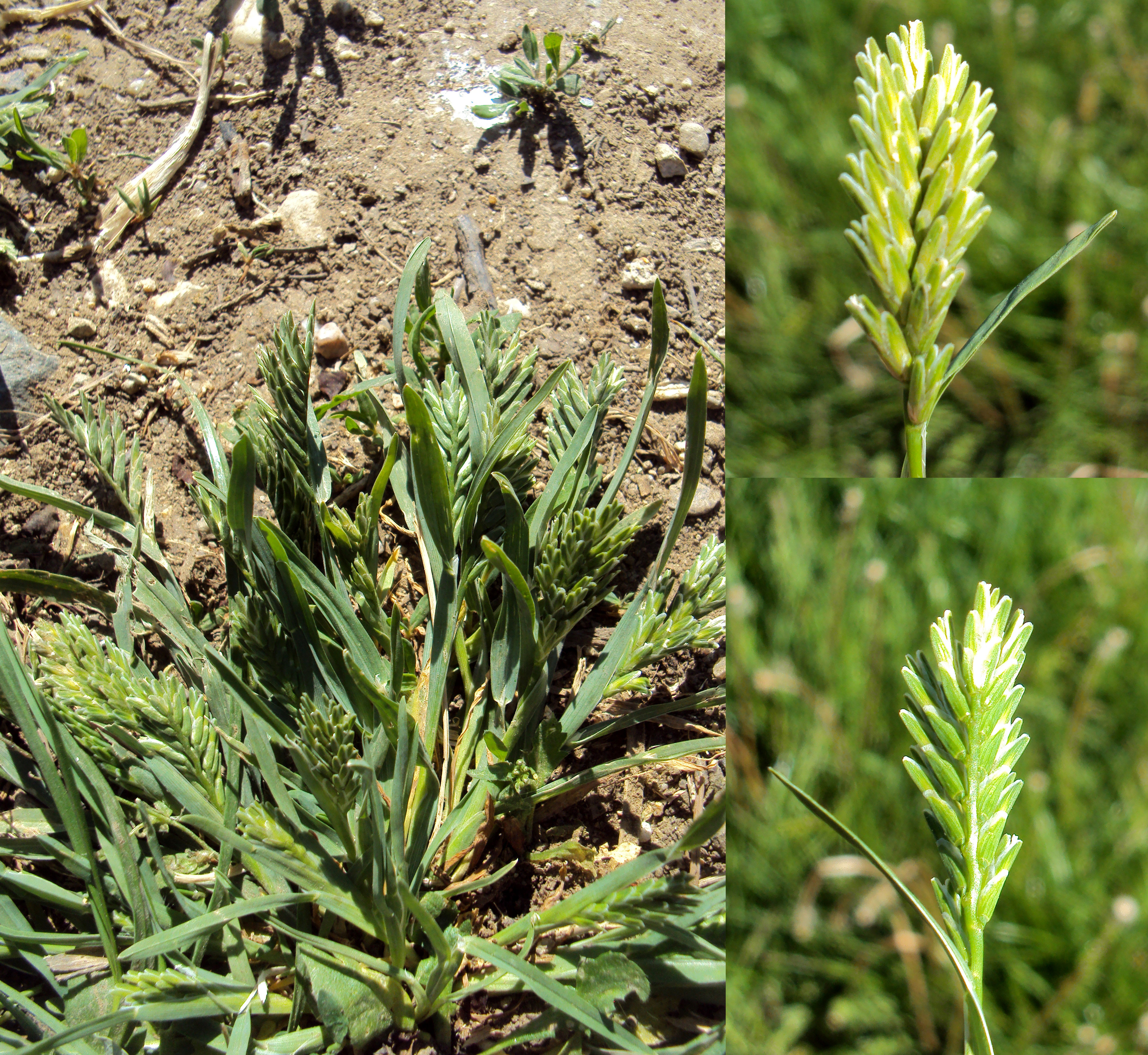 Pouzdřanská step Kolby, Česká republika, jižní Morava